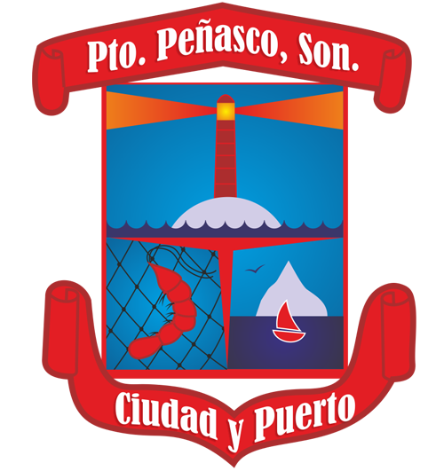 Escudo de Puerto Peñasco, México.